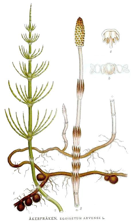 Taf. 515. Abb. 1. Wurzelstock mit Knollen. Fig. 2. Fruchtbare Triebe. Fig. 3. unfruchtbaren Triebe. Fig. 4. Sporangien-Tragplatte (schwach vergrößert). Abb.5. Spore (stark vergrößert).